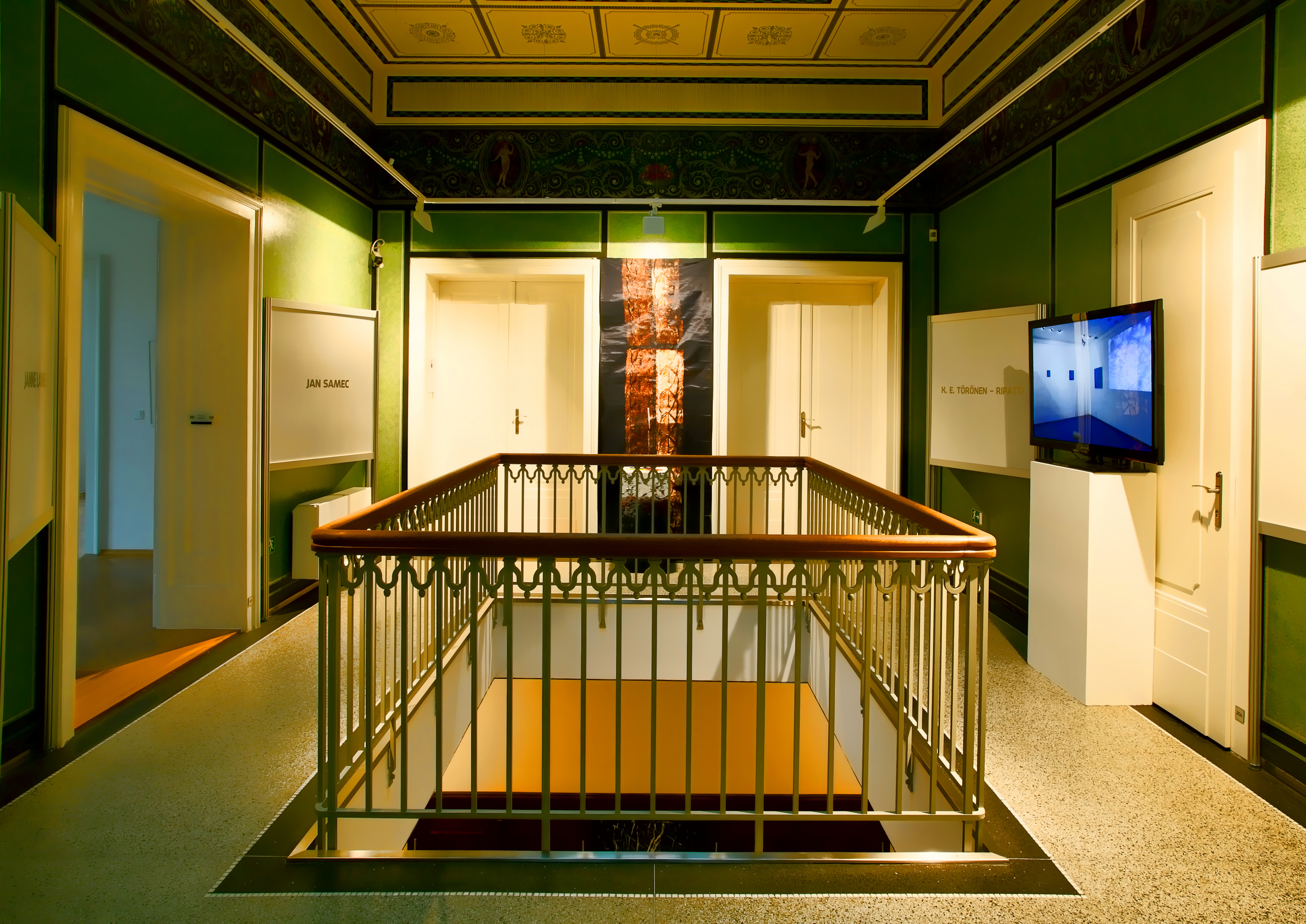 Vila Becher, třída Krále Jiřího 1196/9, Karlovy Vary.